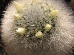 Mammillaria albicoma aus der Sammlung von „Andreae Kakteenkulturen“, Inh. Michael Januschkowetz, Ausserhalb Lengfeld 17, 64853 Otzberg-Lengfeld